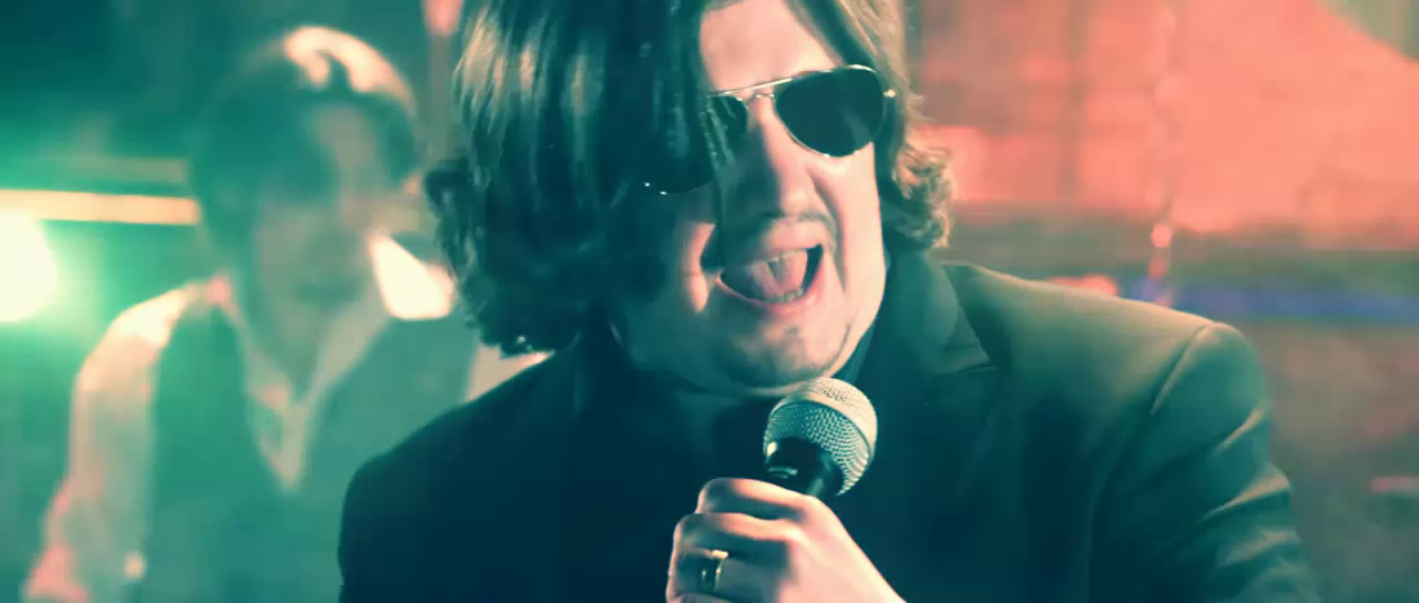 Nicu Țărnă in the video clip for Jucătoru' cu Nicu Țărnă (Gândul Mâței) - Lupt